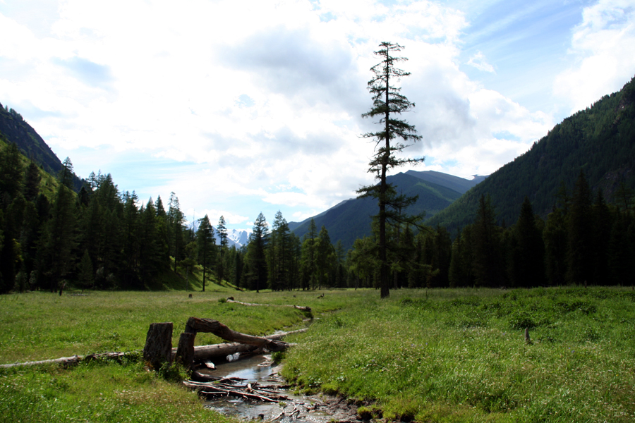 Altay mountains (steppe, forest-steppe), Photo by Vít Hněvkovský, 2006 Altaj (step a lesostep)